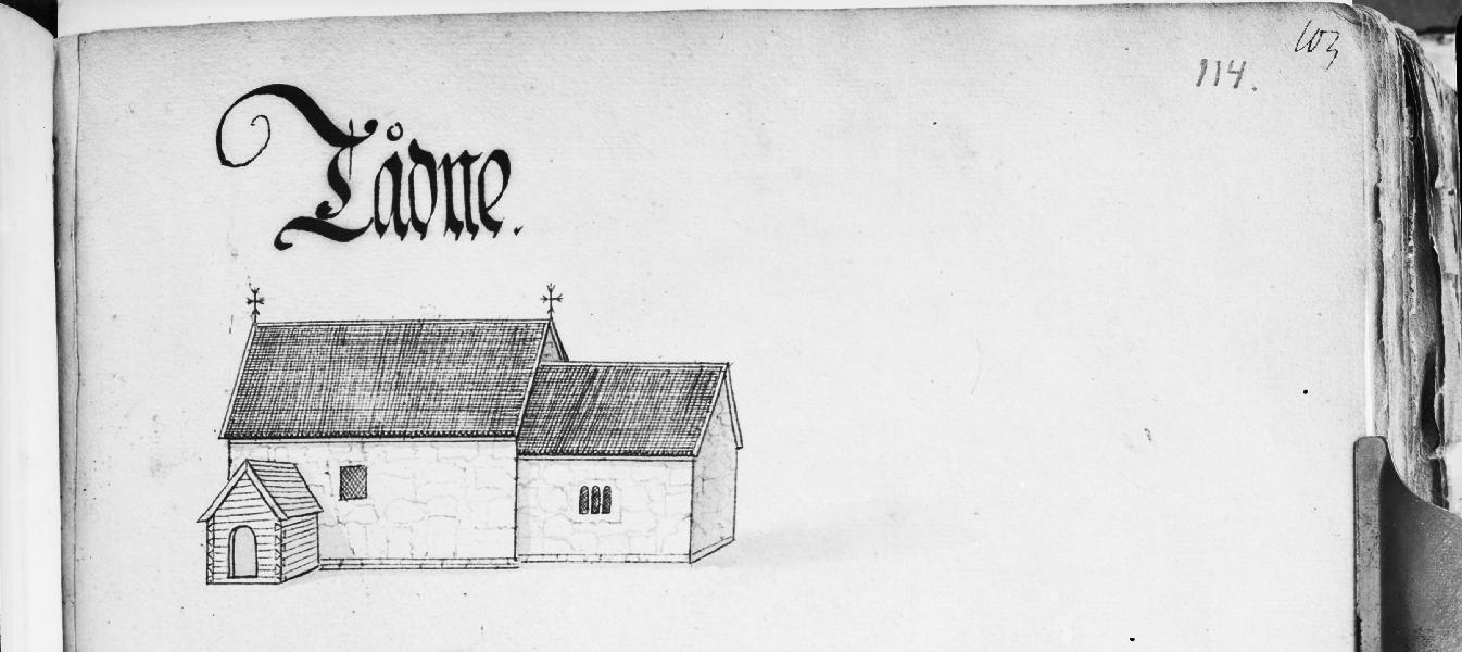 Kyrkan från söder, teckning i Peringskiölds Monumenta, avfotograferad. Kategori: (01) ExteriörerKyrkan från söder, teckning i Peringskiölds Monumenta, avfotograferad.